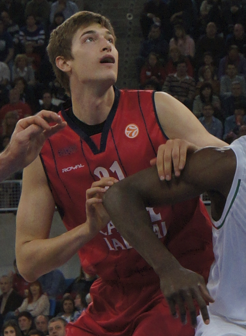 Tibor Pleiß (Saski Baskonia) and Benjamin Eze (Montepaschi Siena)